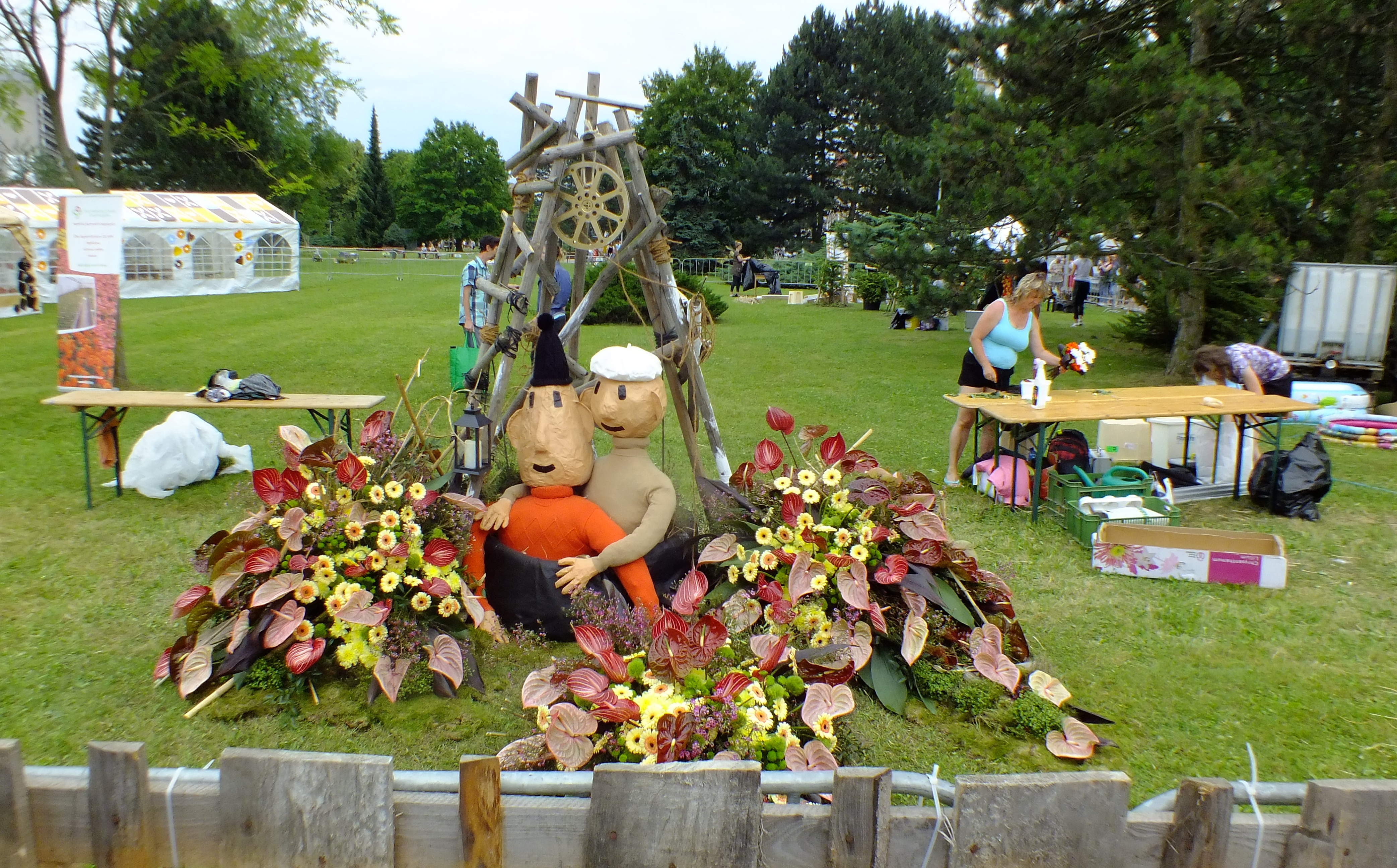 Socha Pata a Mata